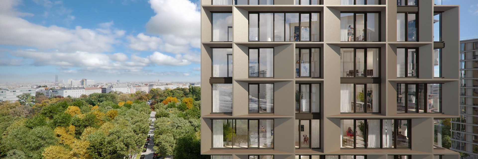 Blick in die Wohnungen der Bel & Main Residences